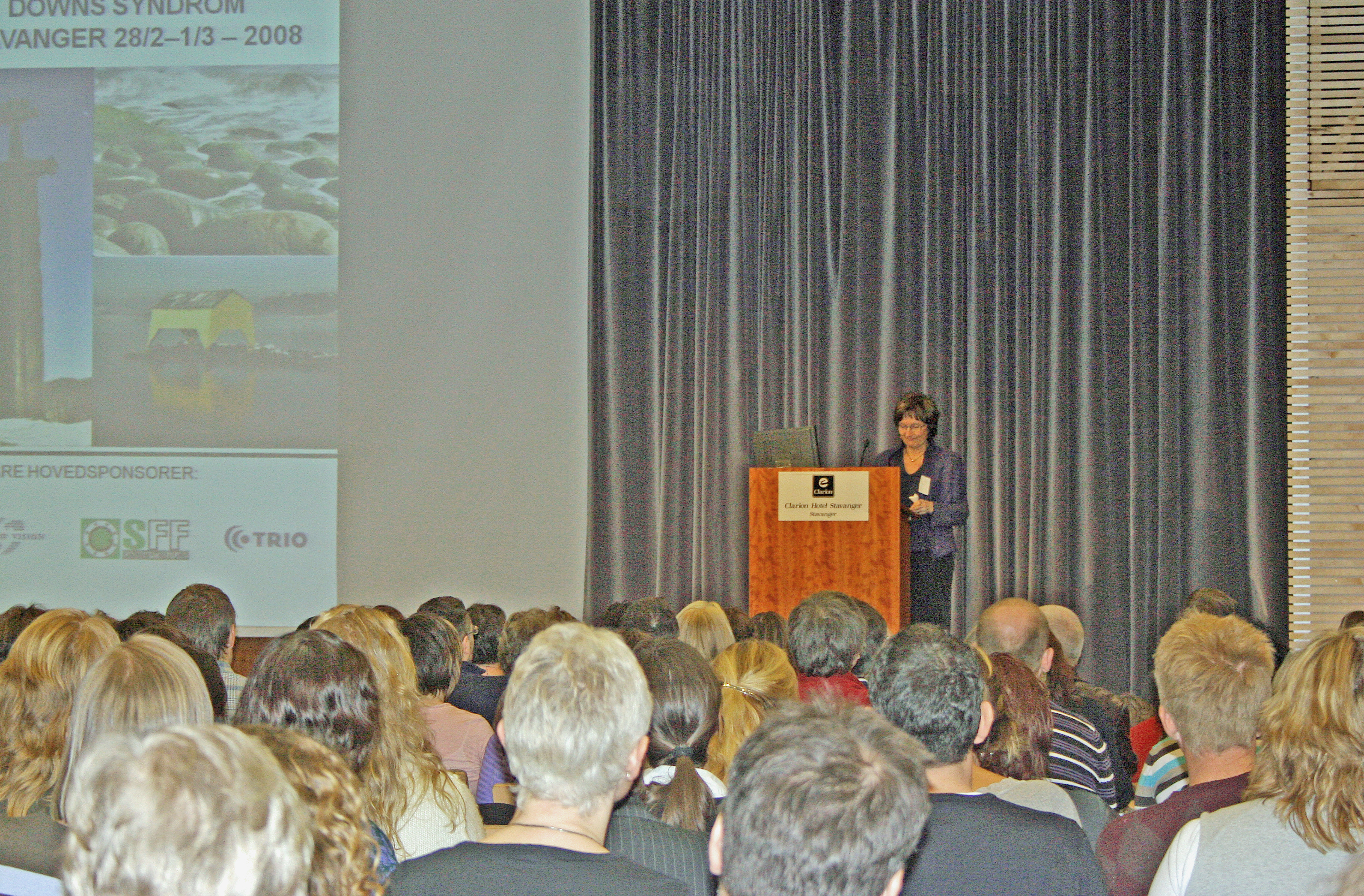 Landskonferansen om Down syndrom 2008 ; Fra åpningen i Stavanger